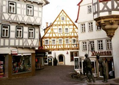 Waiblingen Fachwerkhäuser